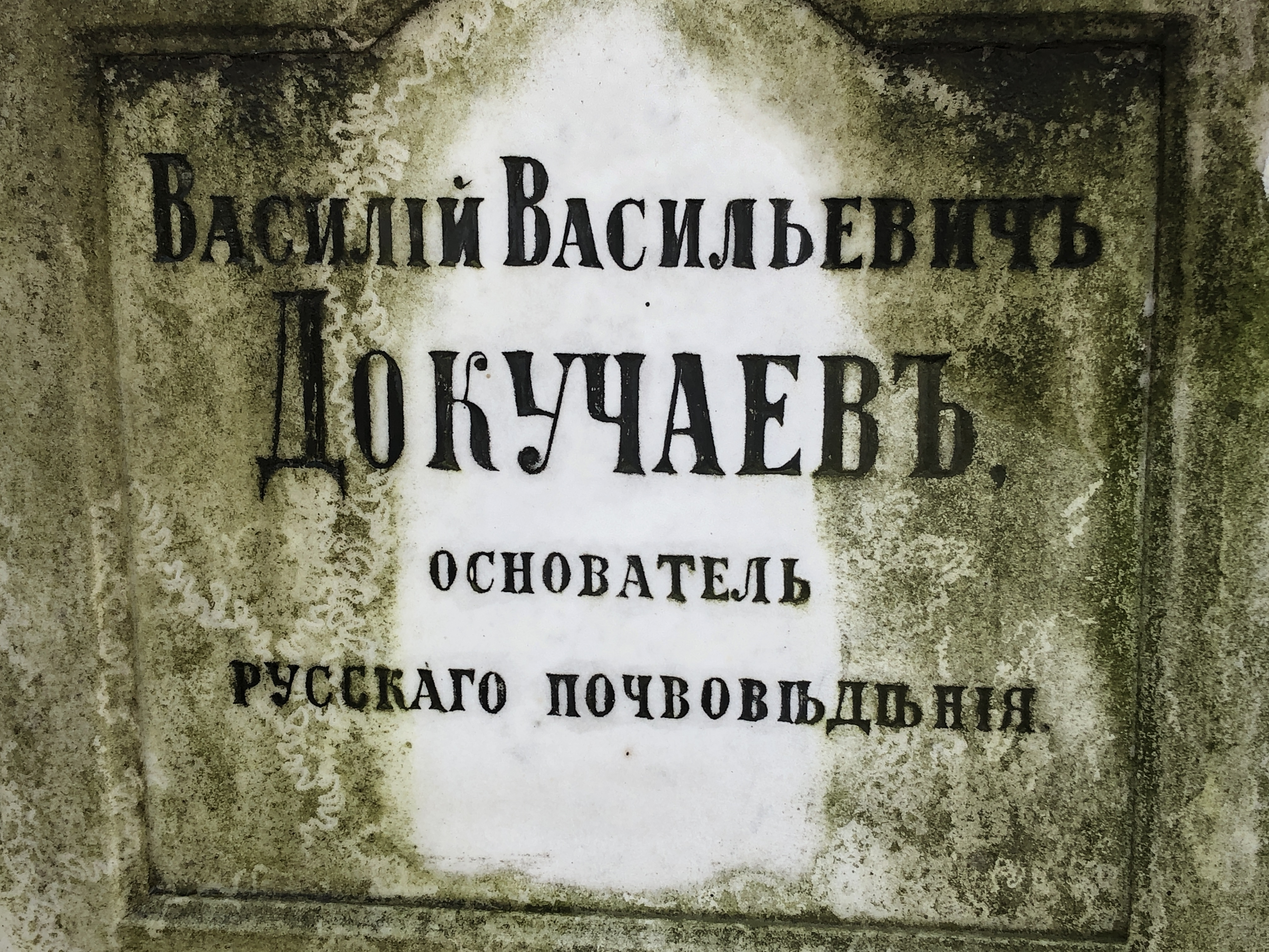 Надпись на могиле Василия Васильевича Докучаева, скончался 26 октября (8 ноября) 1903 года. Похоронен на Смоленском лютеранском кладбище в Санкт-Петербурге.